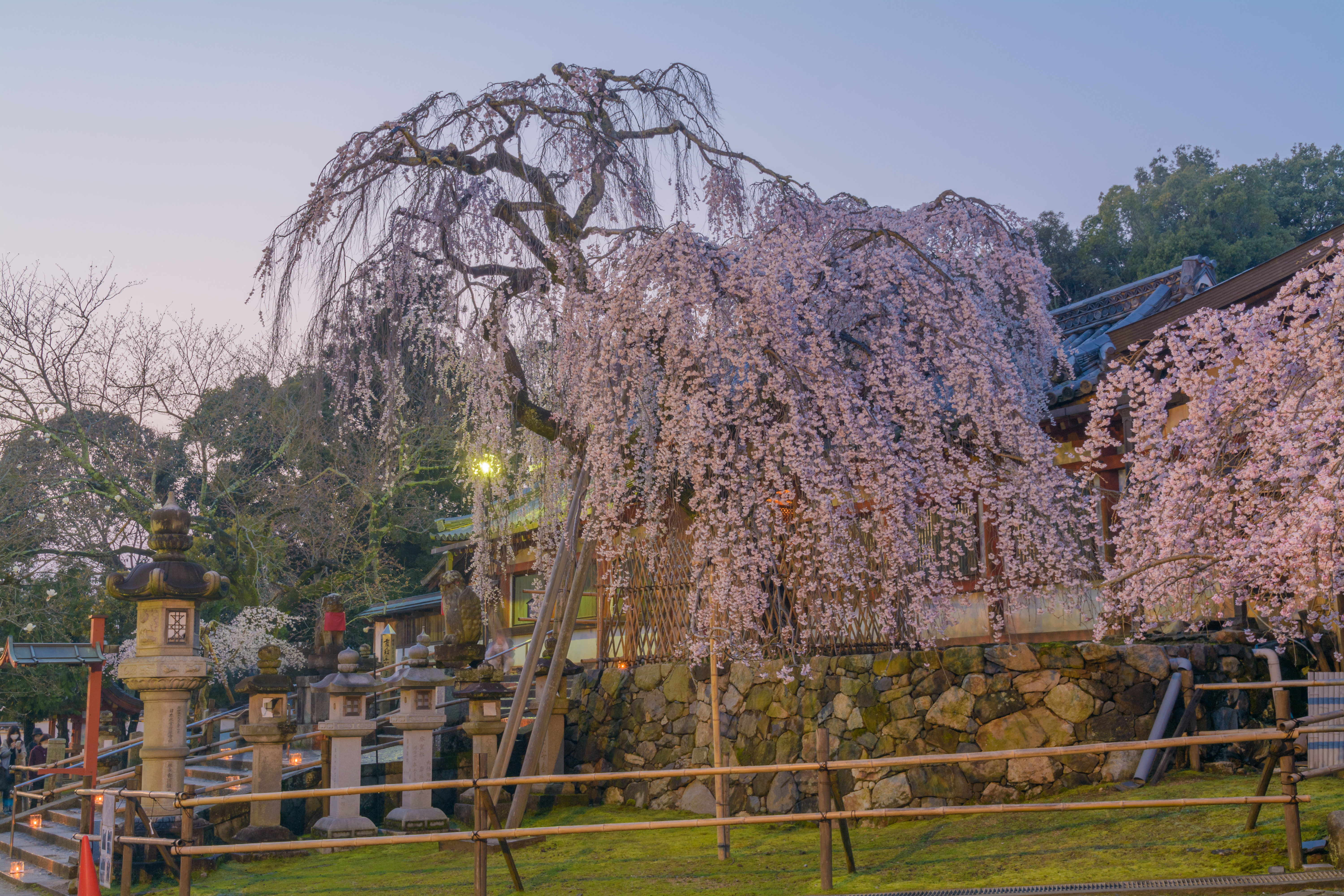 氷室神社（奈良県奈良市）の枝垂れ桜